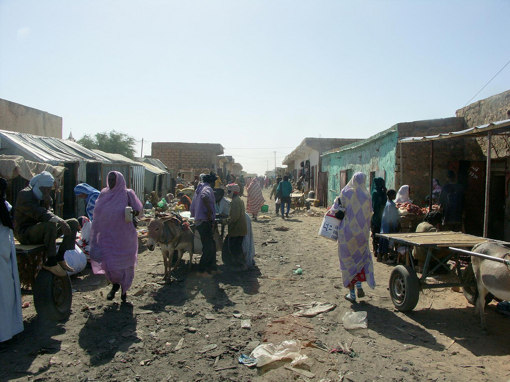 Morning market; Kiffa, Mauritania.